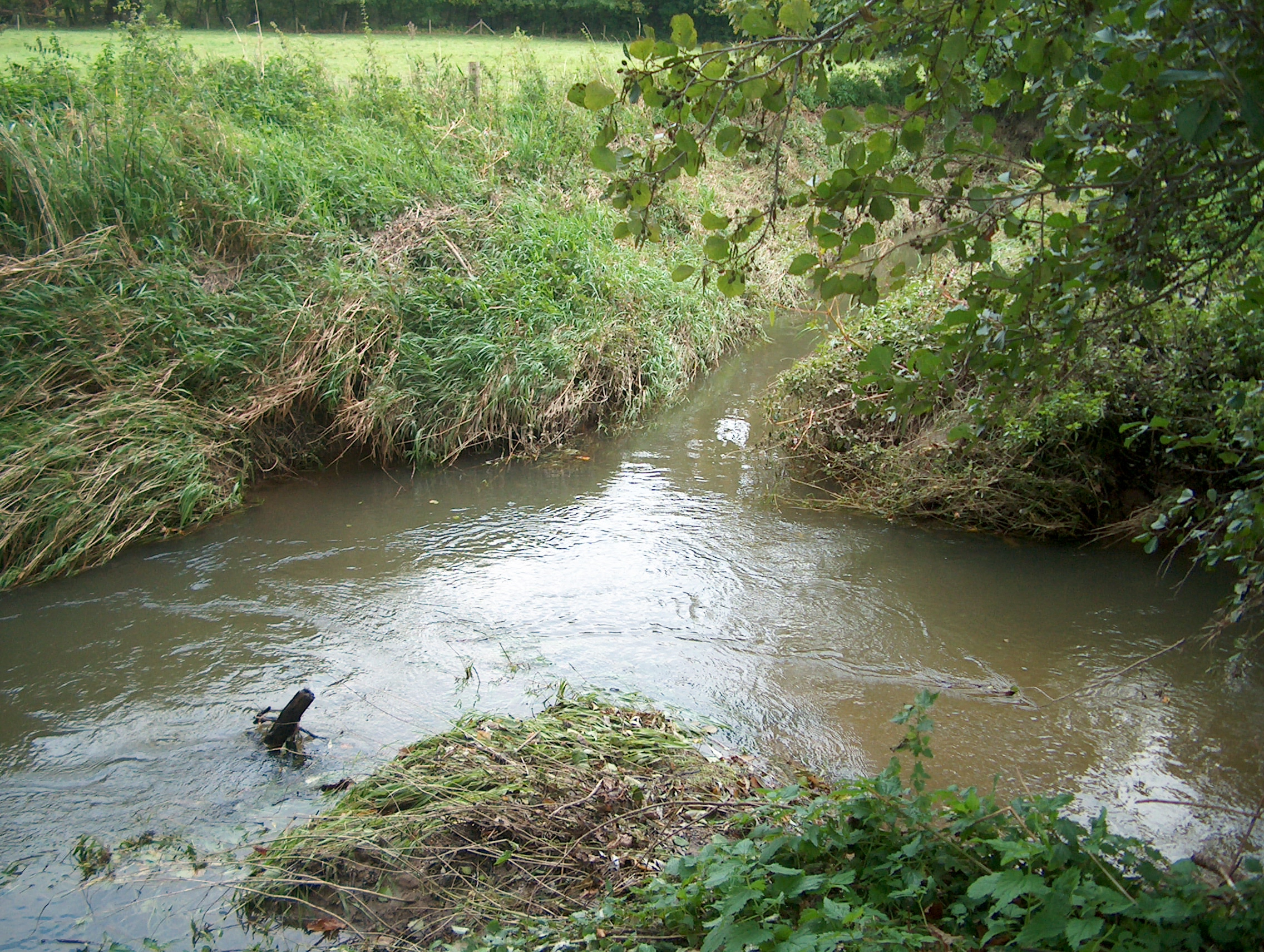 Ústí Satkuly do Klášterní vody